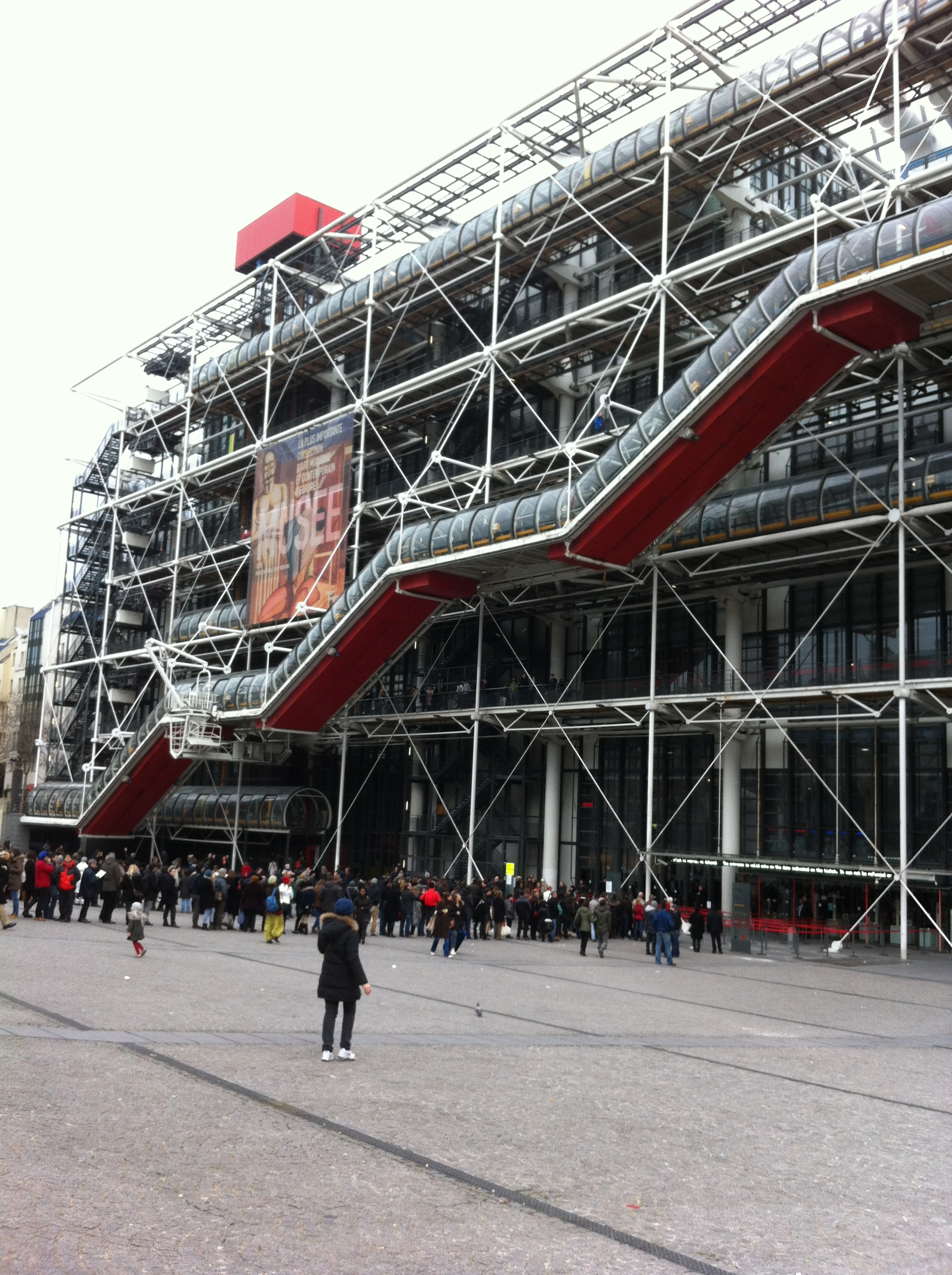 Saint-Merri, 75004 Paris, France